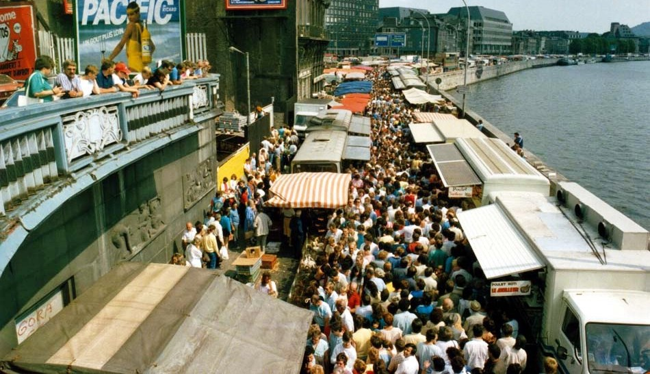 Maart op der Batte zu Léck